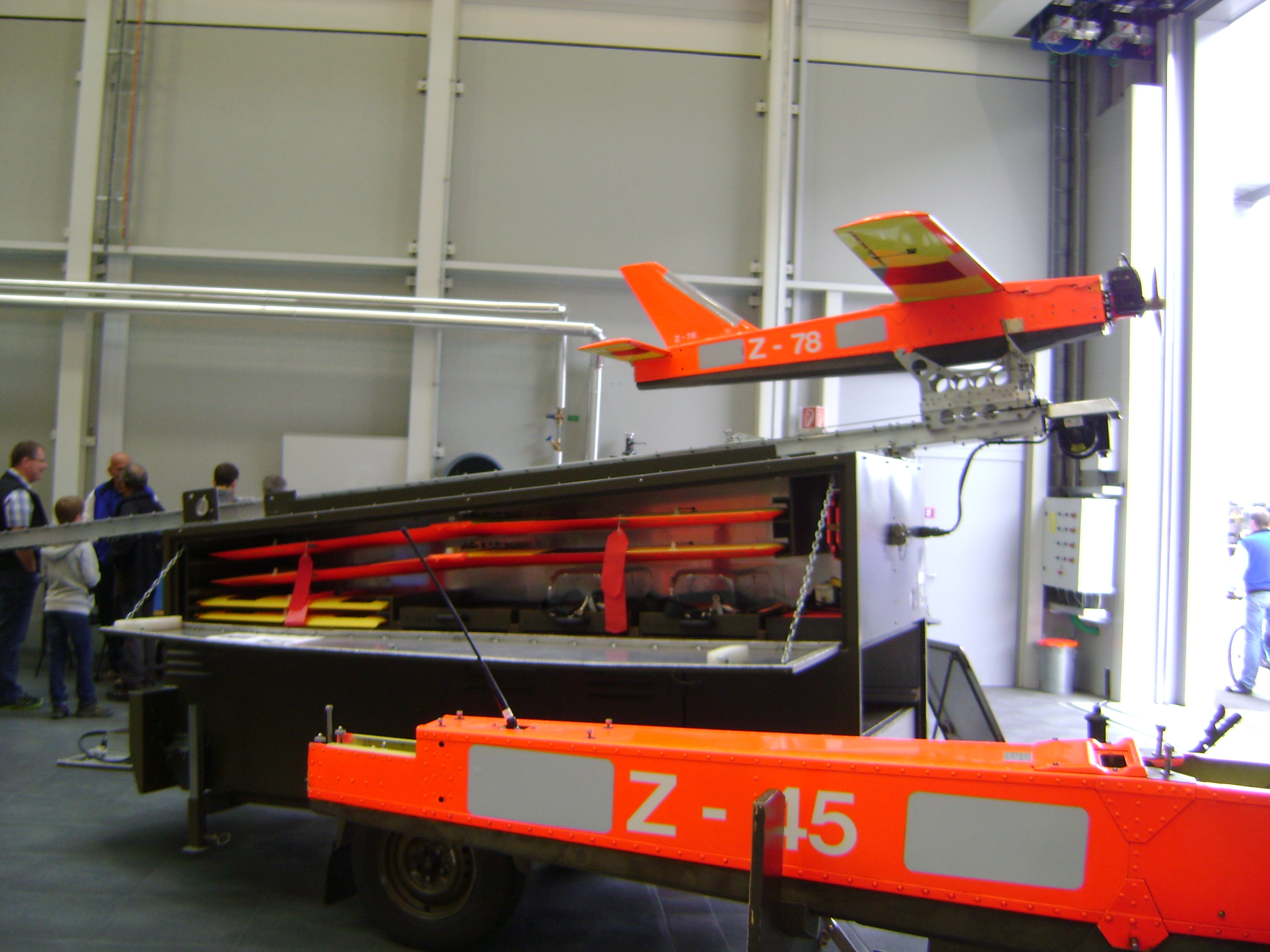 Farner Zieldrohne